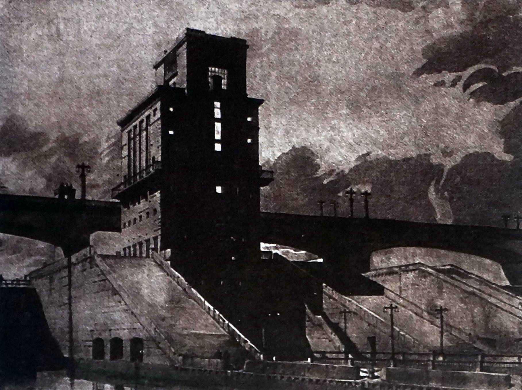 Перспектива башни управления на средней голове шлюза. Ранний проект Жигулёвского гидроузла